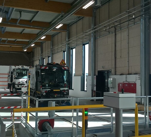 Photographie d'une voie de garage du l'atelier de maintenance, prise lors des portes ouvertes du CEM du tramway de Caen